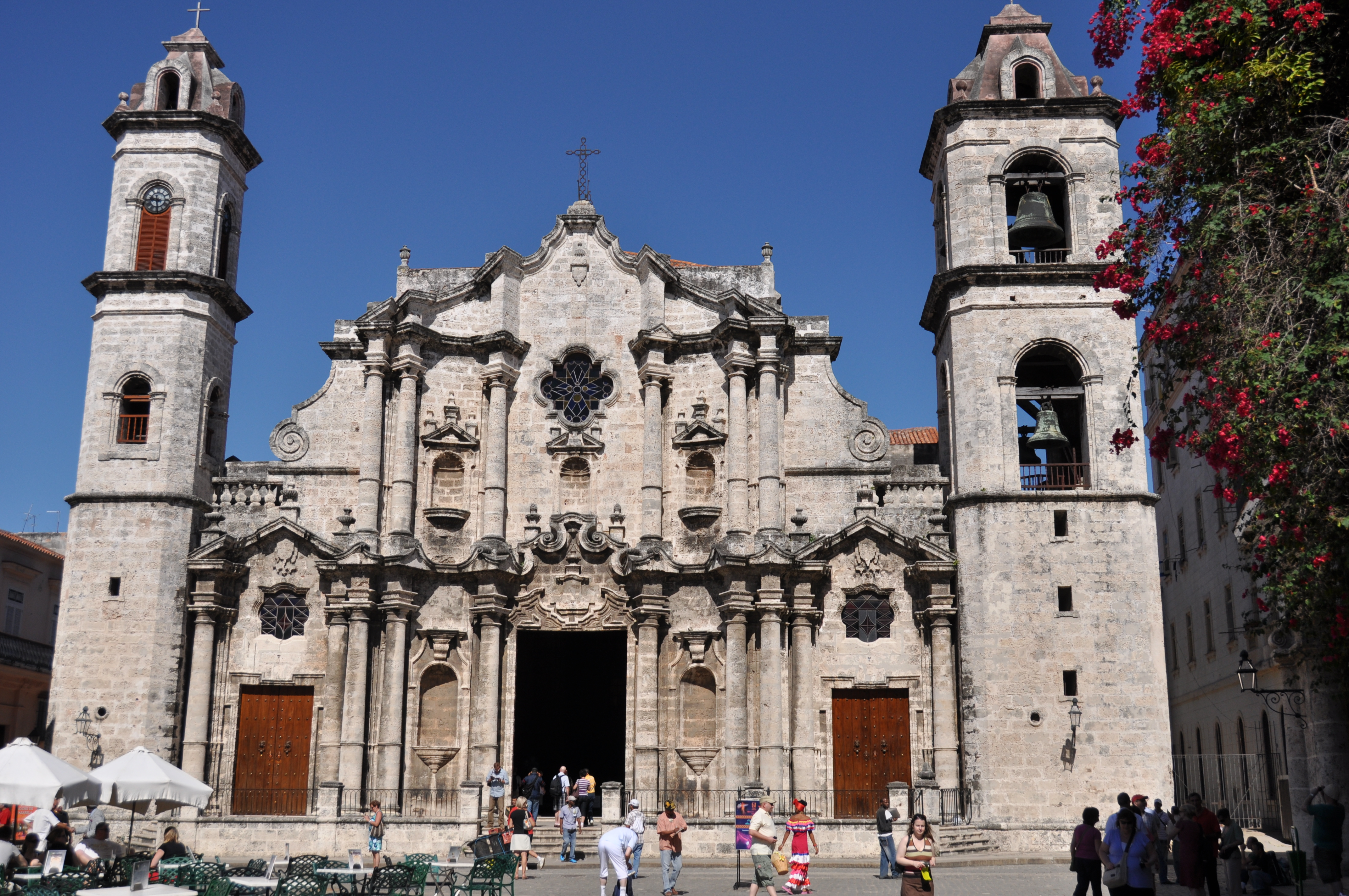 Catedral de San Cristobal de La Habana